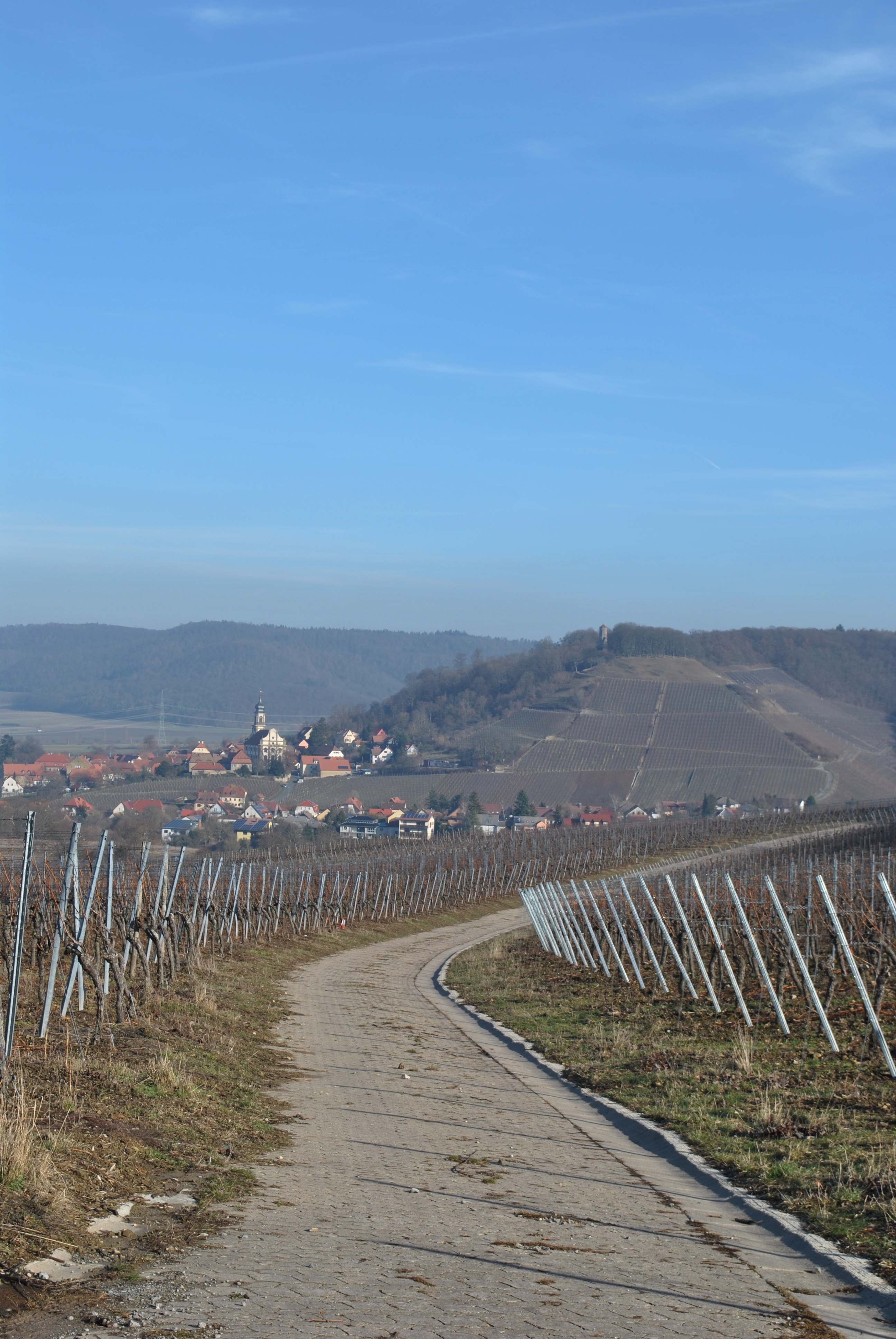 Panorama Castell, darüber Herrenberg